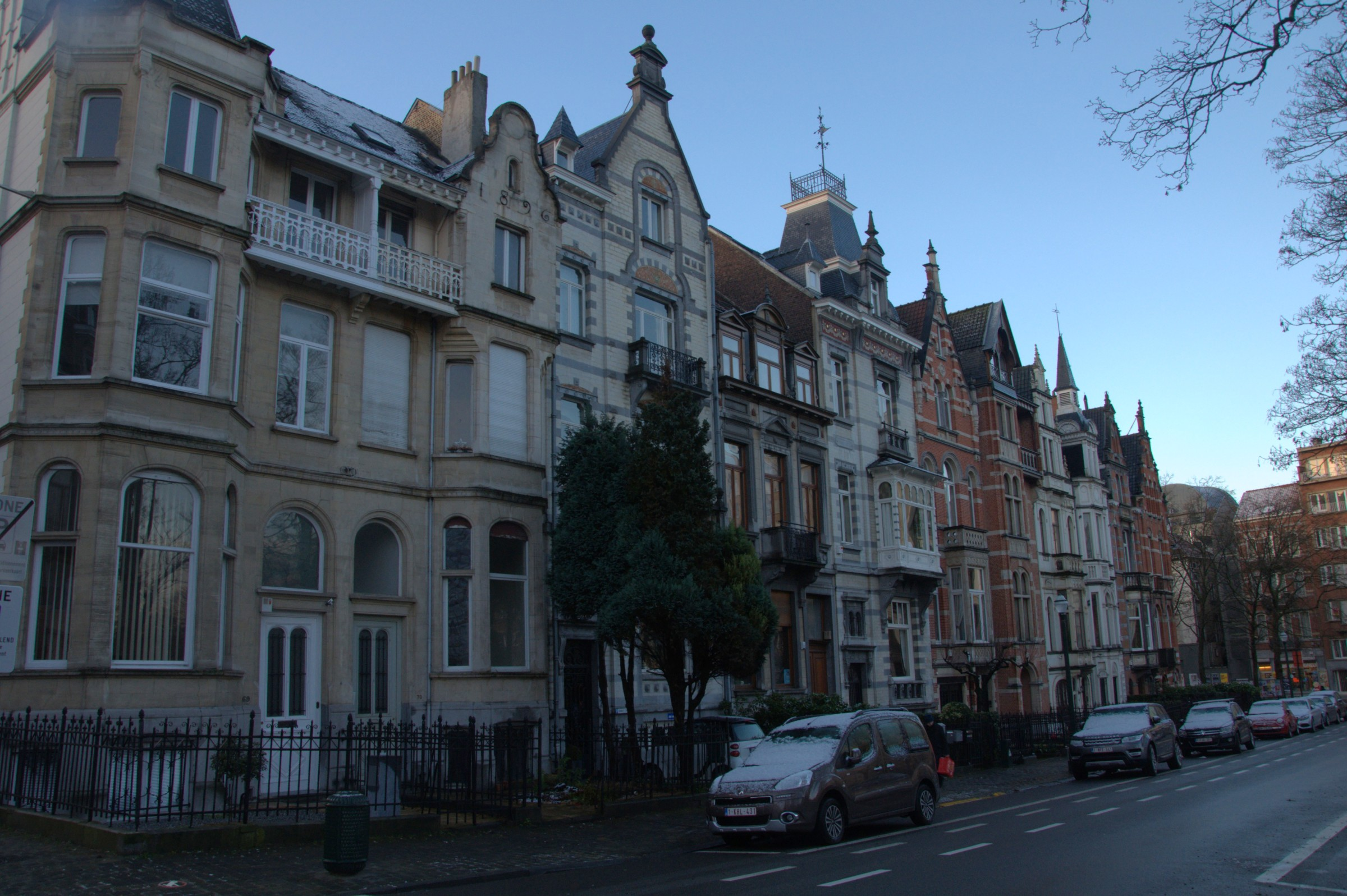 patrimoine immobilier de bruxelles